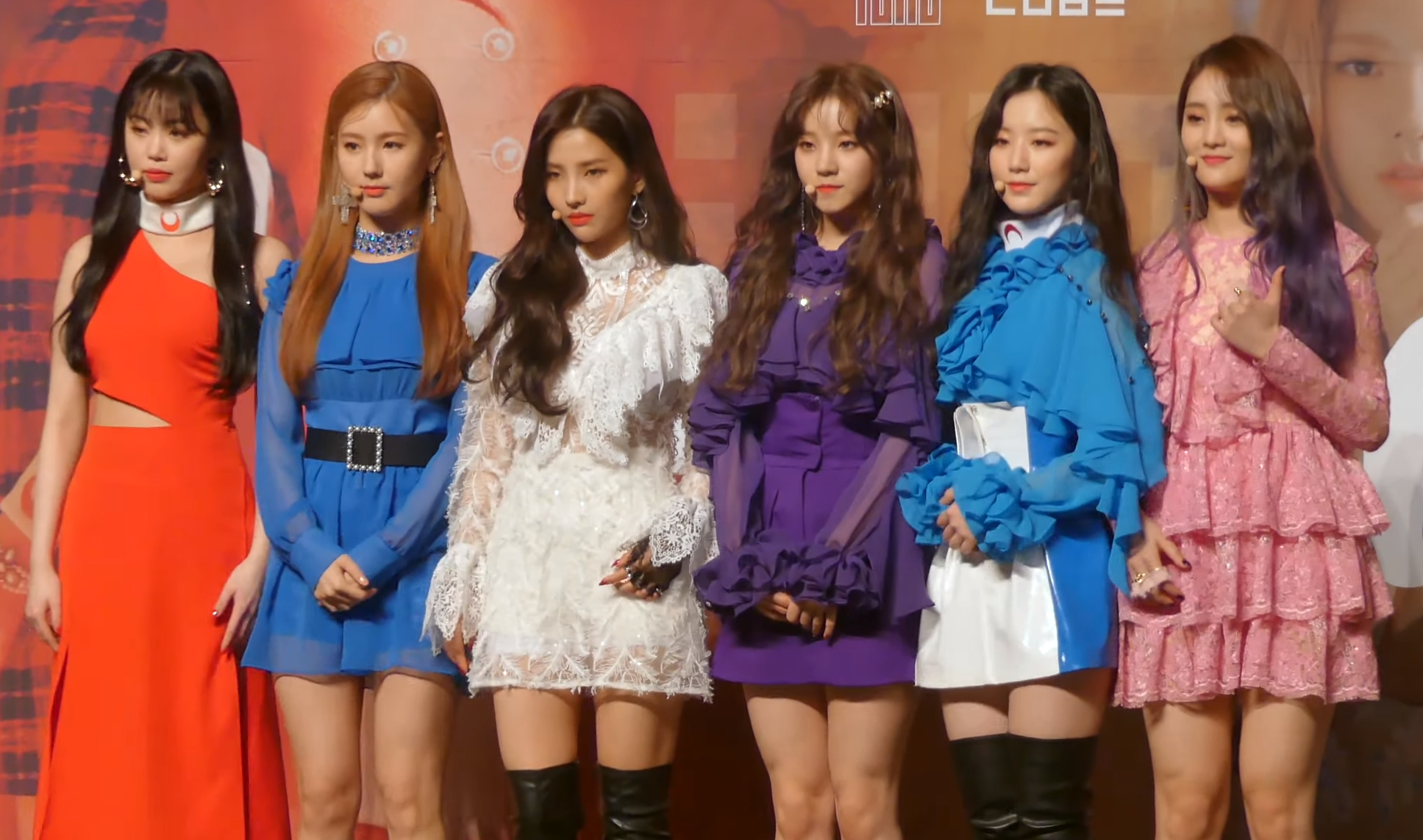 0226 미연X민니X수진X소연X우기X슈화 매력넘치는 포토타임 (여자)아이들 미니2집 쇼케이스.